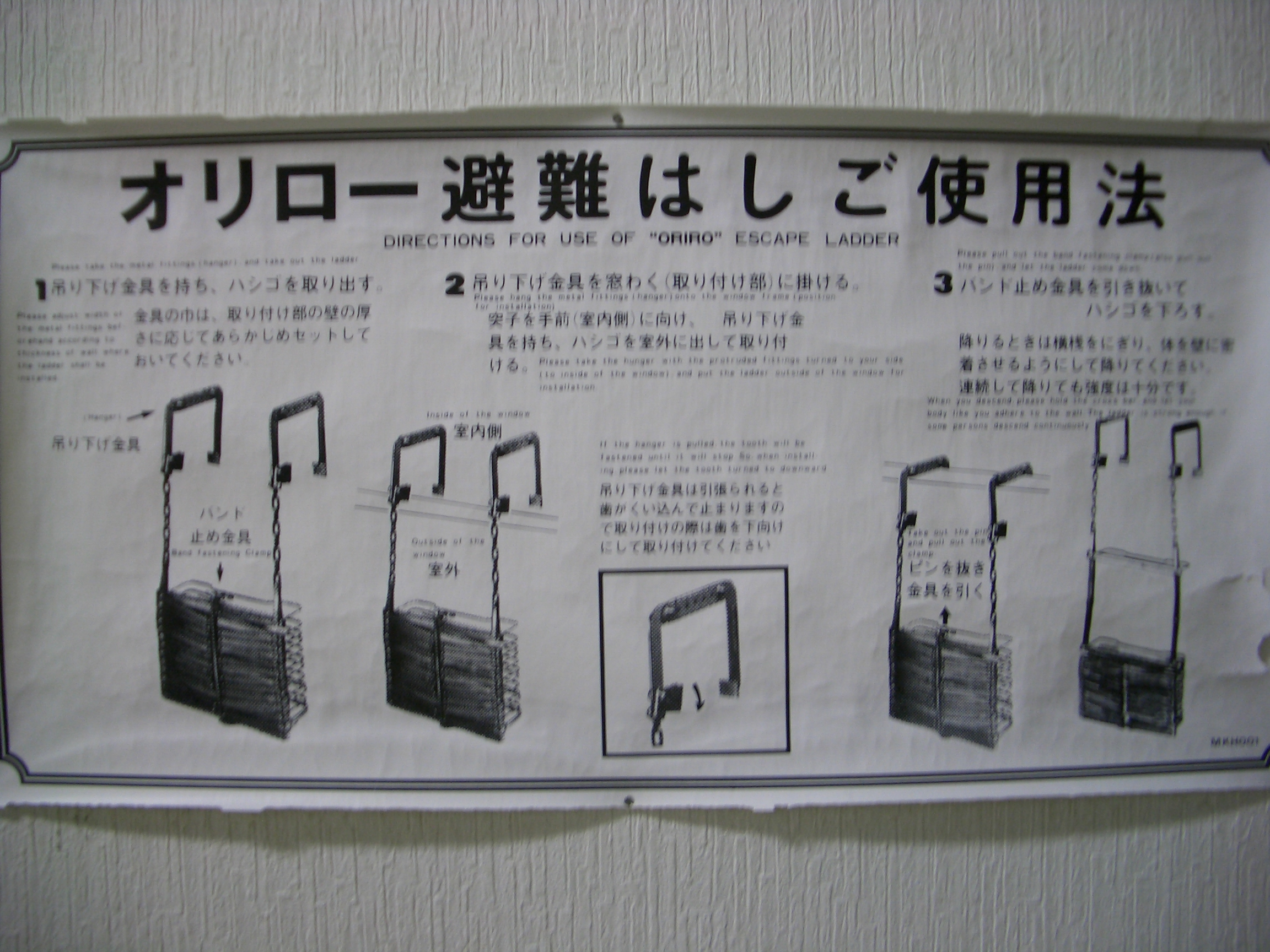 本当に避難出来るの？ [1]